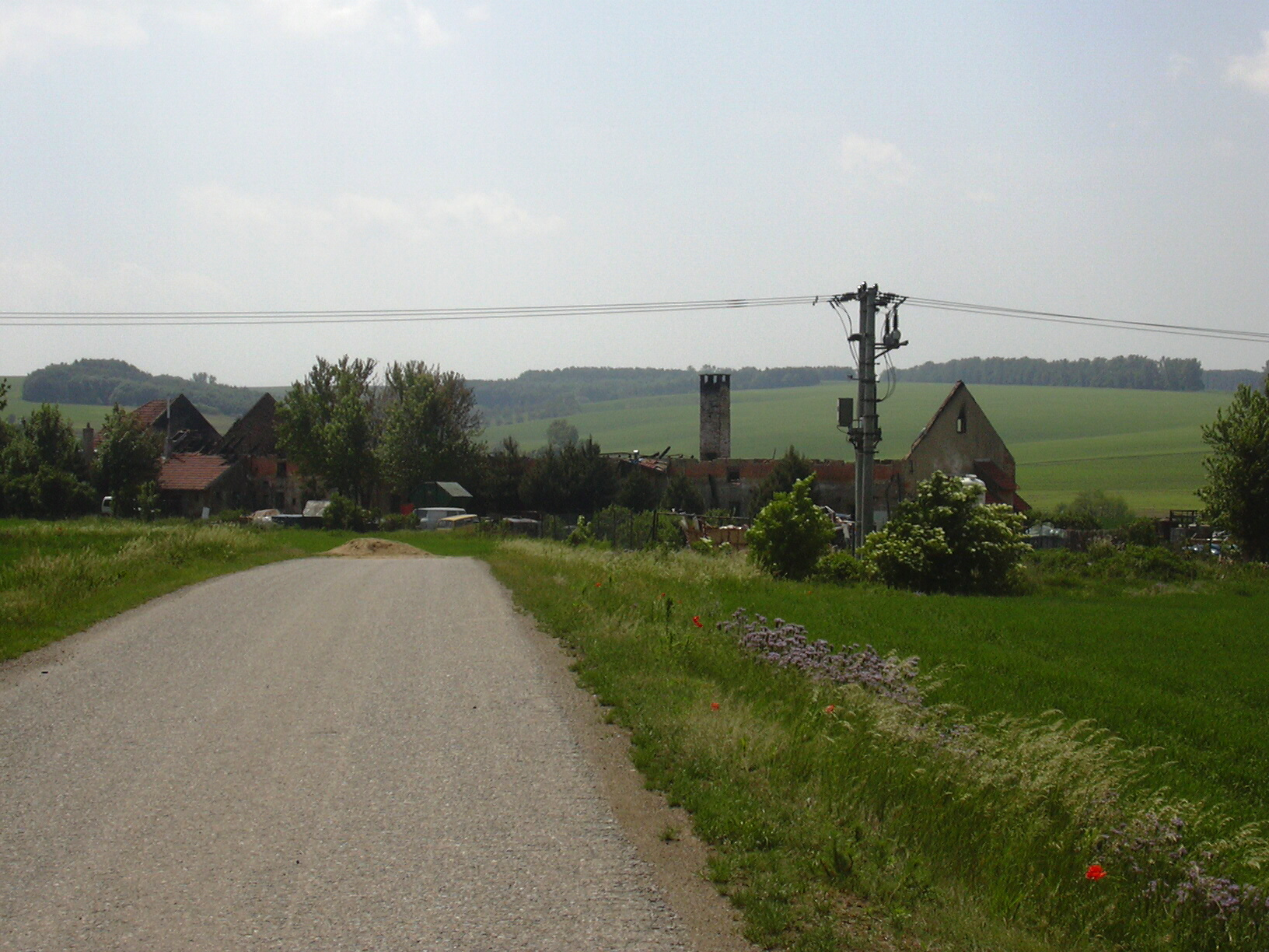 Podbřežice po požáru 2007(Vyškov- czech republic)